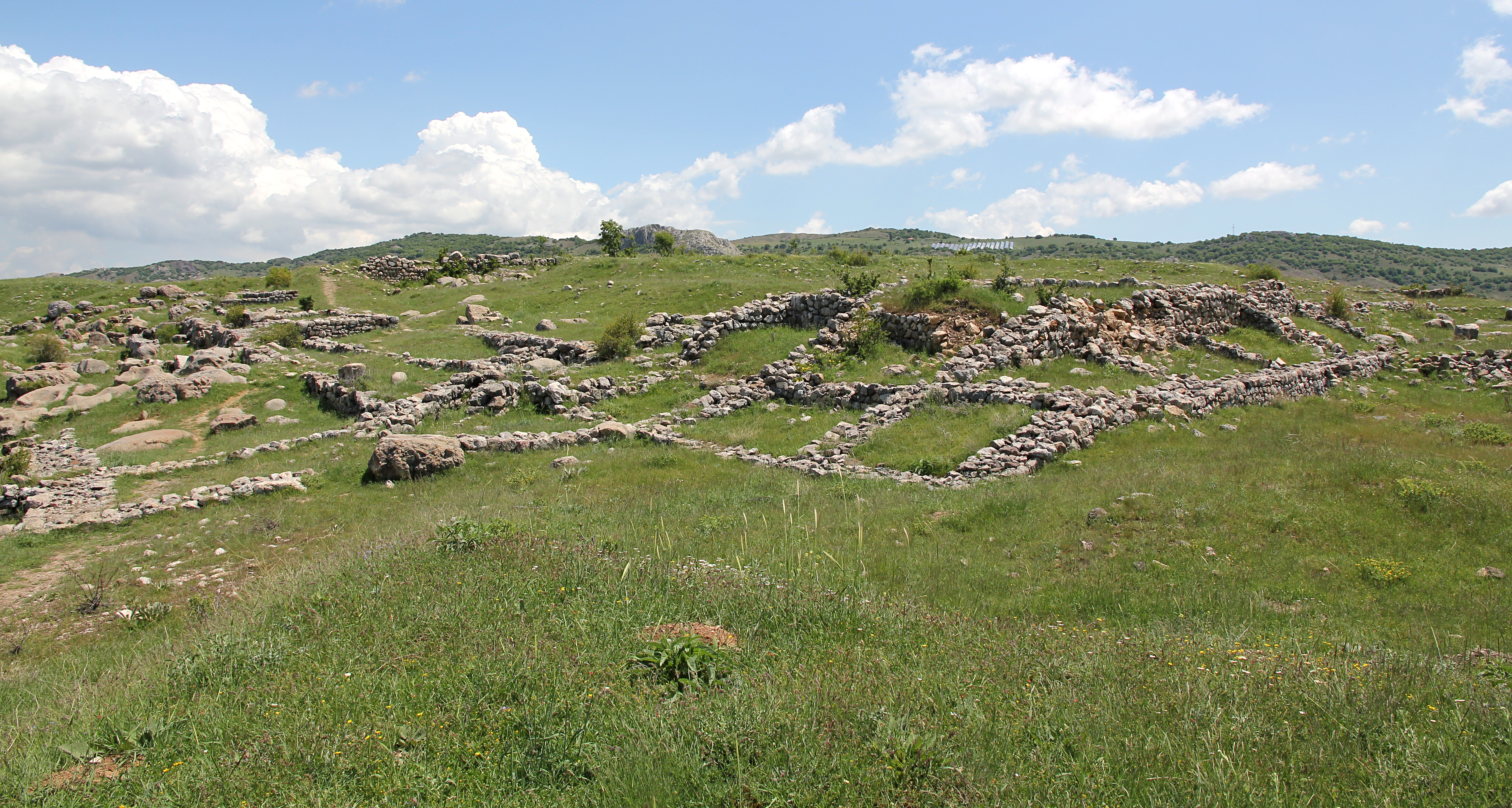 Büyükkale, die Zitadelle der hethitischen Hauptstadt Hattuša bei Boğazkale, Zentraltürkei, Torbau zwischen unterem und mittleren Burghof, links der Verbindungsbau zu Gebäude D